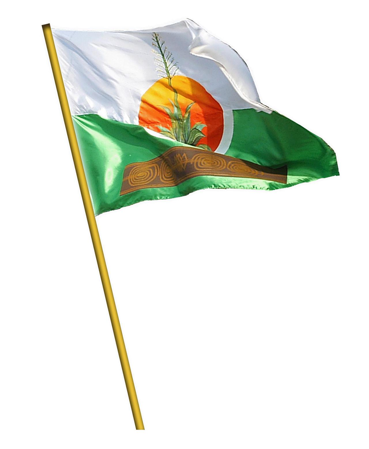 bandera de Pital de Megua, un corregimiento del municipio de Baranoa, departamento del Atlántico, República de Colombia.